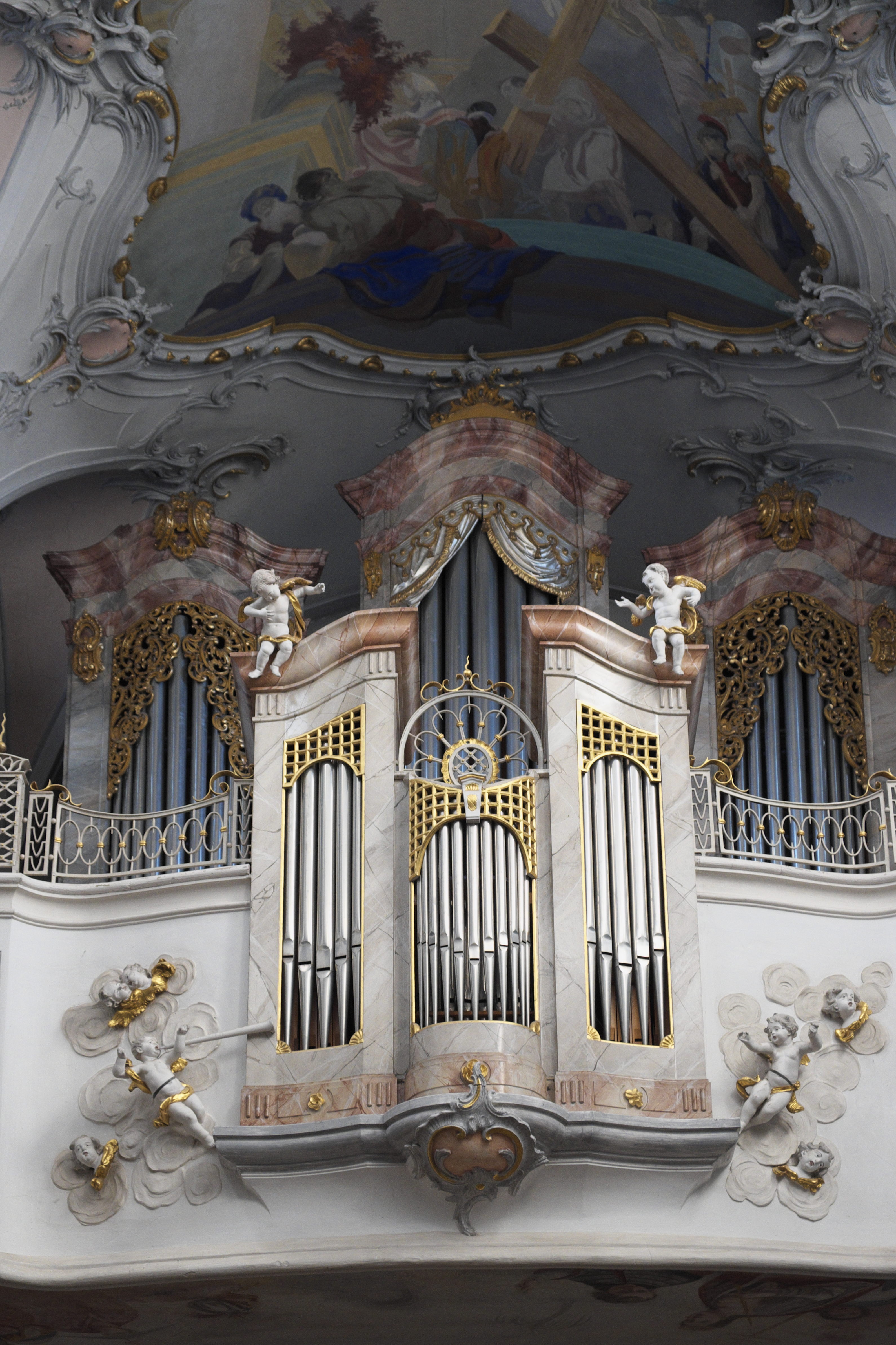 Katholische Pfarr- und Benediktinerabteikirche Mariä Himmelfahrt und des Heiligen Kreuzes des Klosters Scheyern in Scheyern im Landkreis Pfaffenhofen an der Ilm (Bayern/Deutschland), Orgel